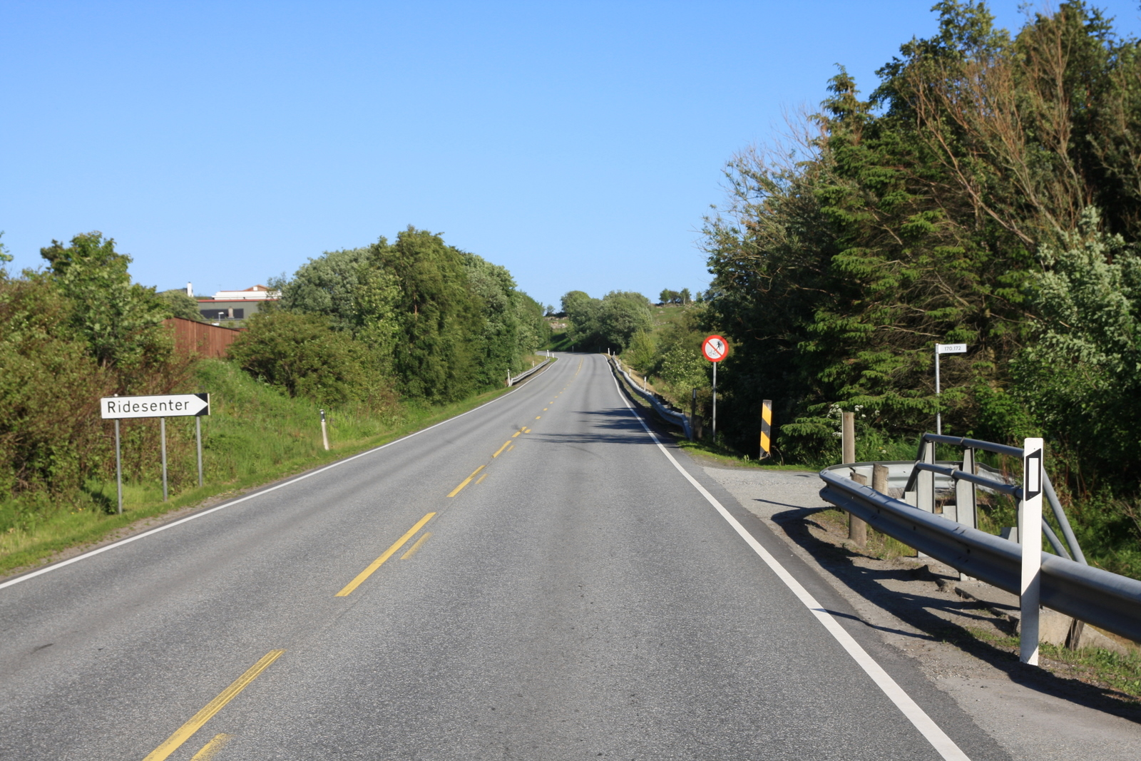 Fylkesvei 510 Solaveien mot Kleppe